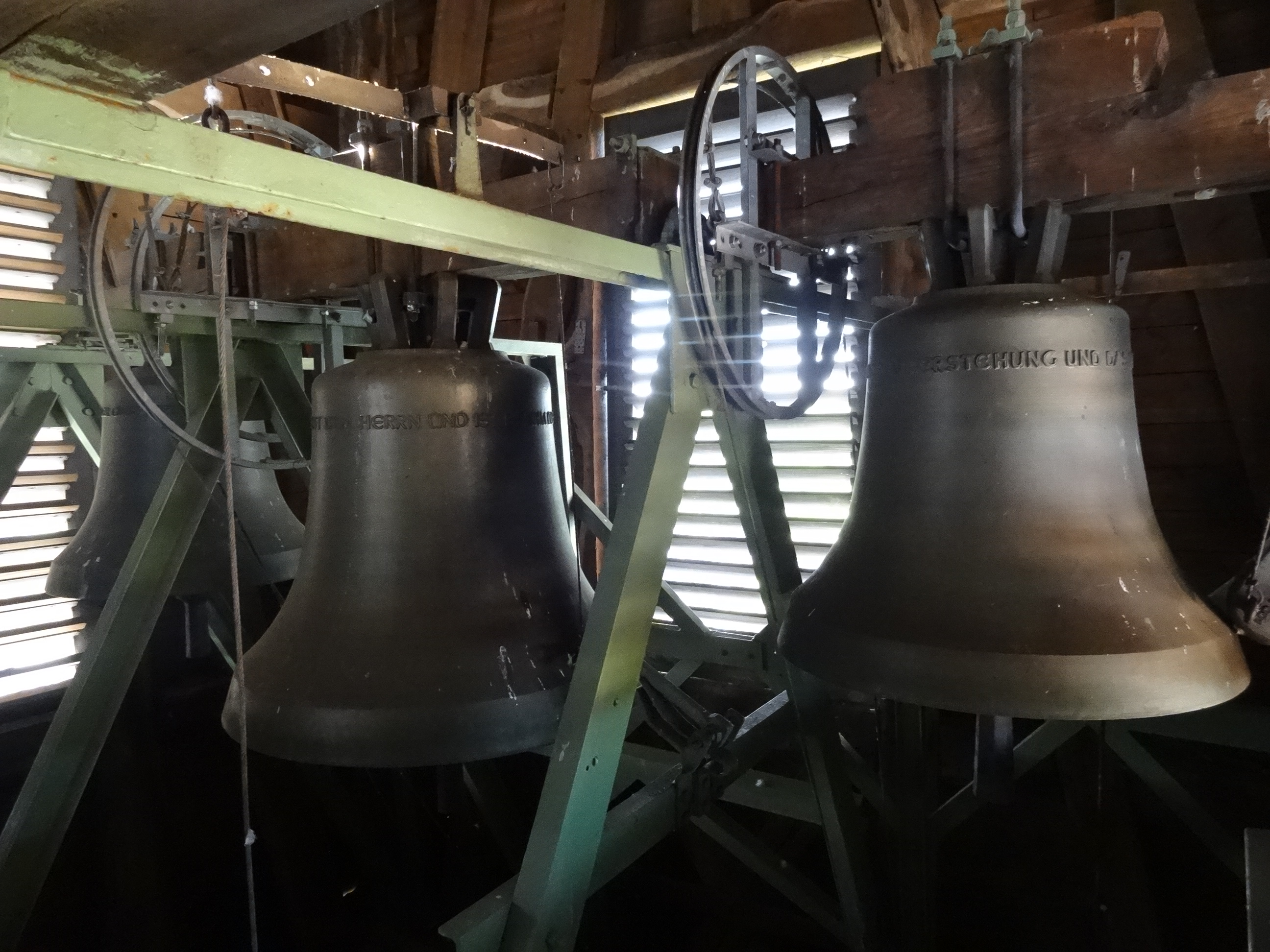 Evangelische Kirche Birklar